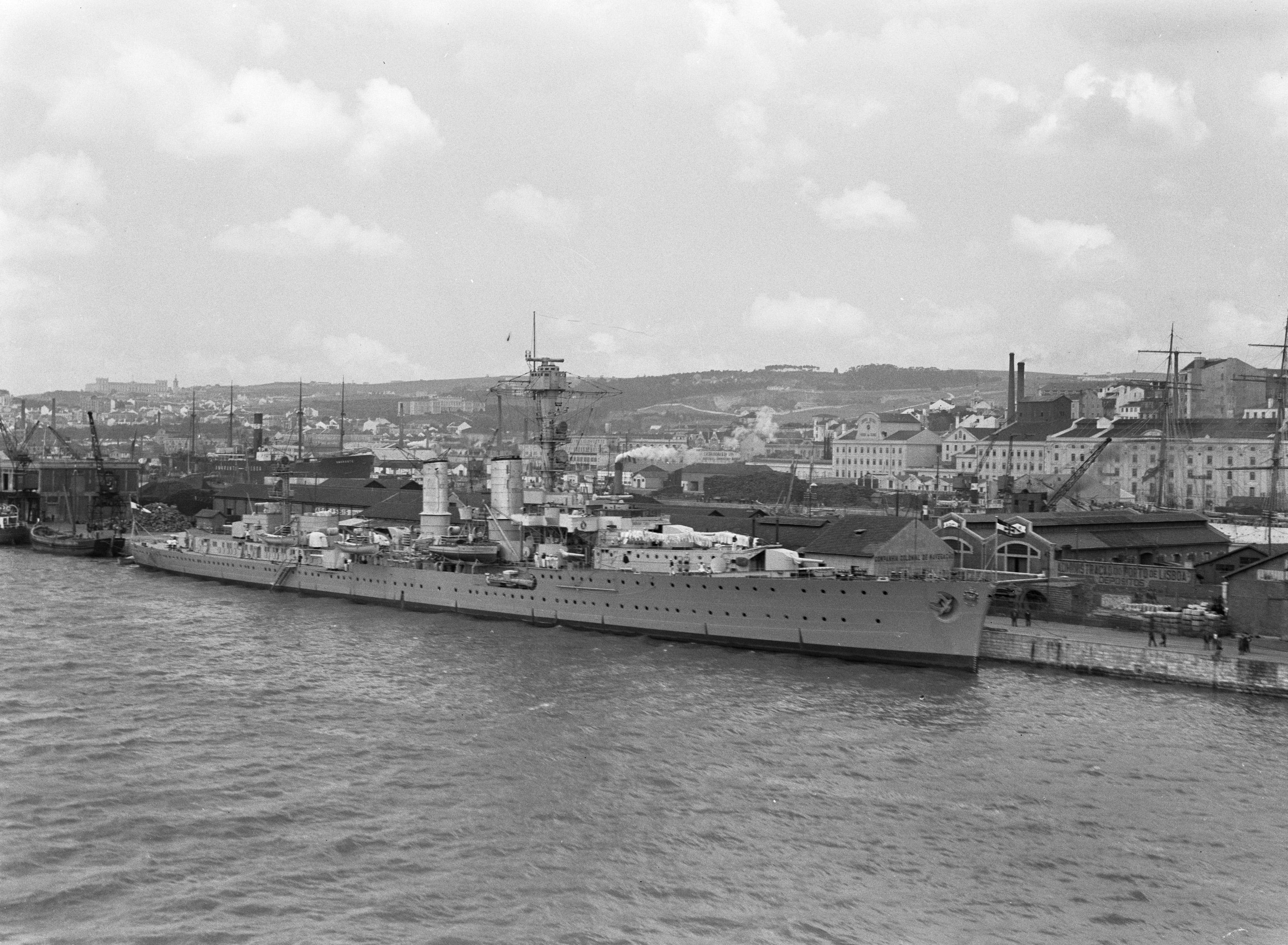 Collectie / Archief : Fotocollectie Van de Poll Reportage / Serie : Zeereis met MS Baloeran Beschrijving : Gezicht op Lissabon met een oorlogsschip in de haven Annotatie : Deze foto maakt deel uit van een serie foto's van een reis met de MS Baloeran van de Rotterdamse Lloyd Datum : mei 1935 Locatie : Lissabon, Portugal Trefwoorden : havens, militaire vaartuigen, panorama's Fotograaf : Poll, Willem van de Auteursrechthebbende : Nationaal Archief Materiaalsoort : Glasnegatief Nummer archiefinventaris : bekijk toegang 2.24.14.02 Bestanddeelnummer : 191-0201